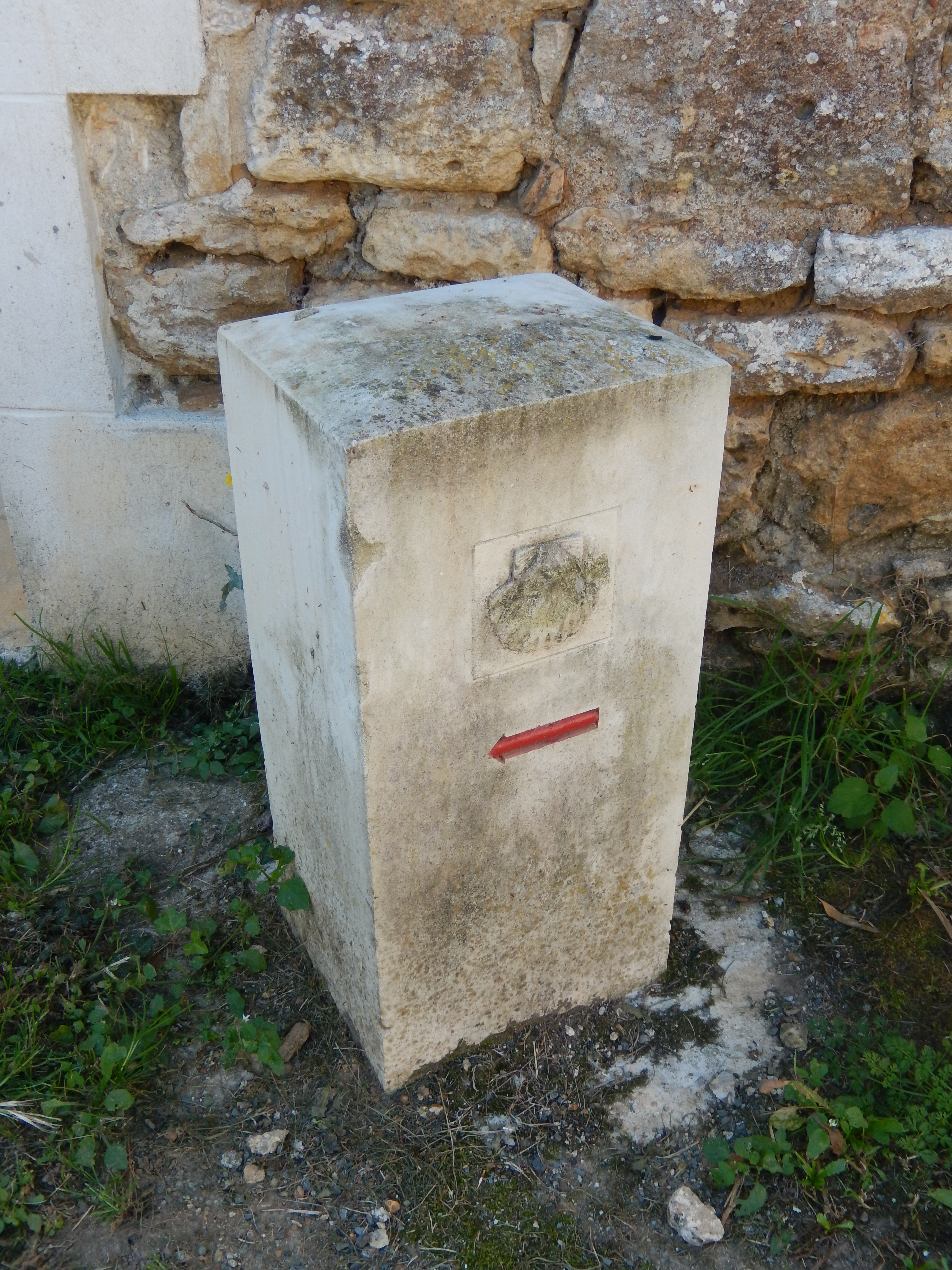 De telles bornes jonchent le Chemin de Compostelle (Via Torunensis) qui passe dans la commune de Juicq, en Charente-Maritime.